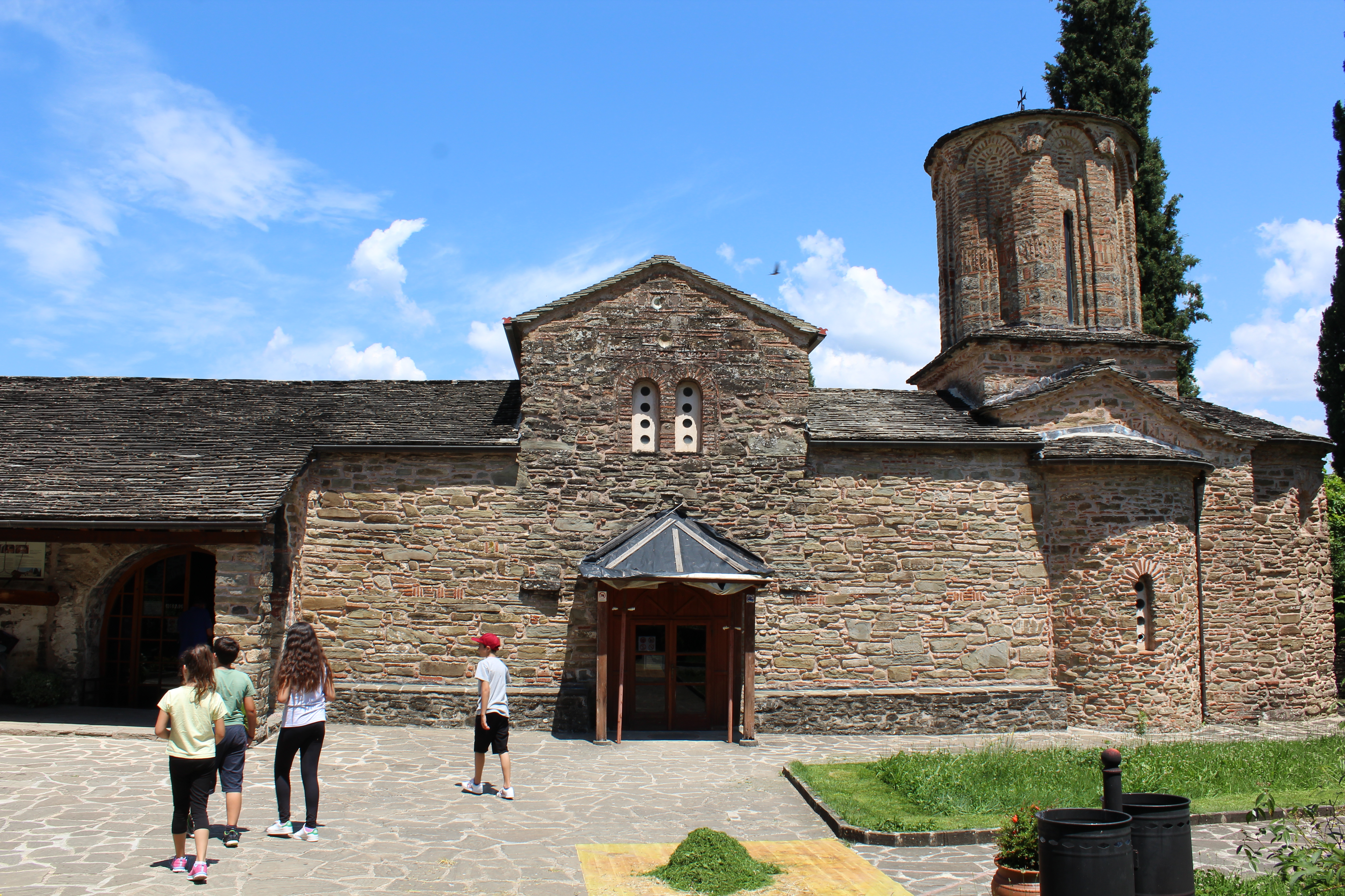 Μονή Μολυβδοσκέπαστου«Μονή Μολυβδοσκέπαστου»